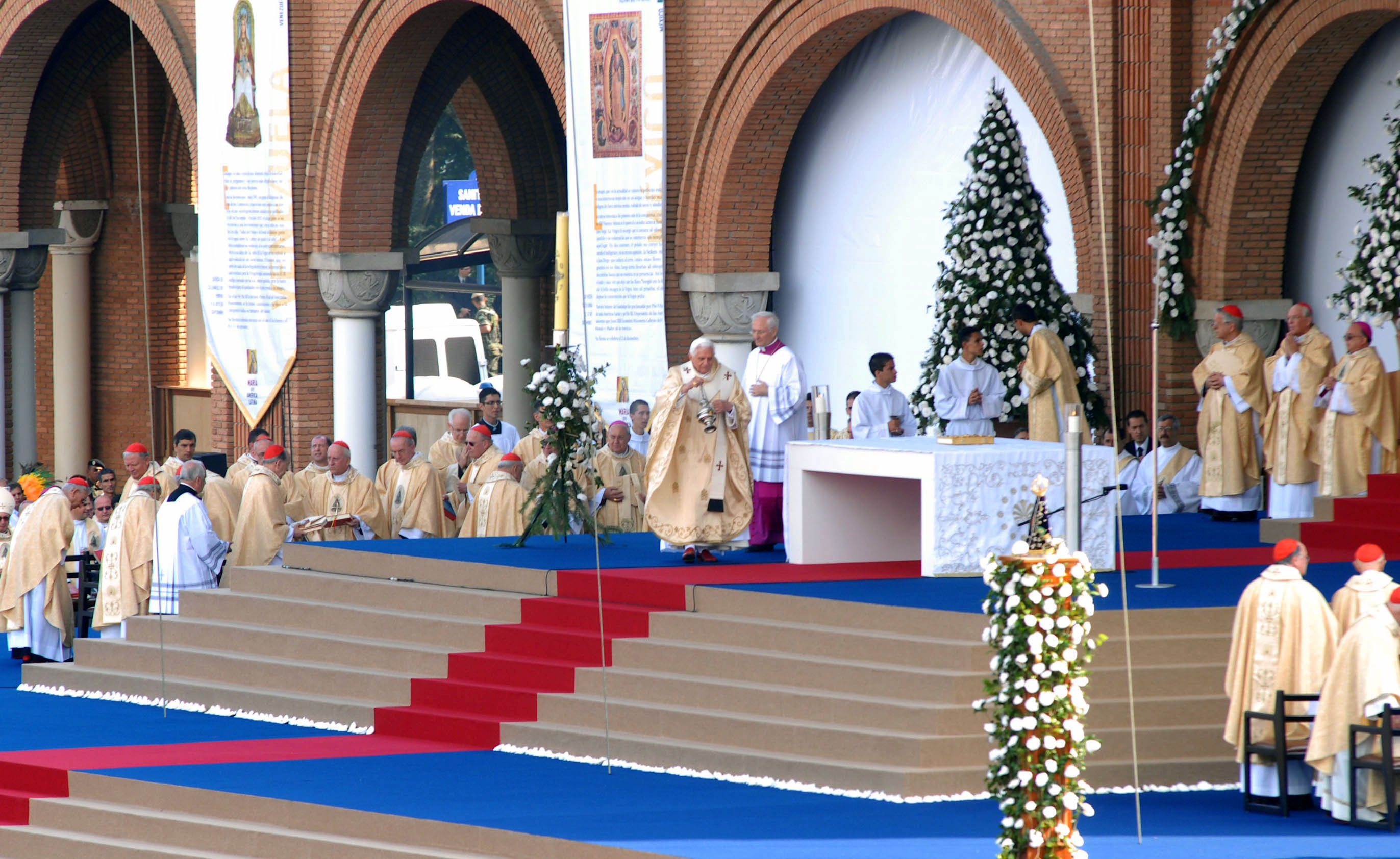 Papa Bento XVI durante missa na Basílica de Nossa Senhora Aparecida, no interior do estado de São Paulo, Brasil.